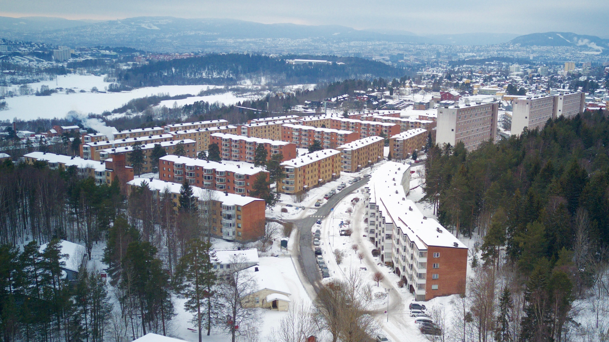 Nedre del av Bølerlia i Oslo.